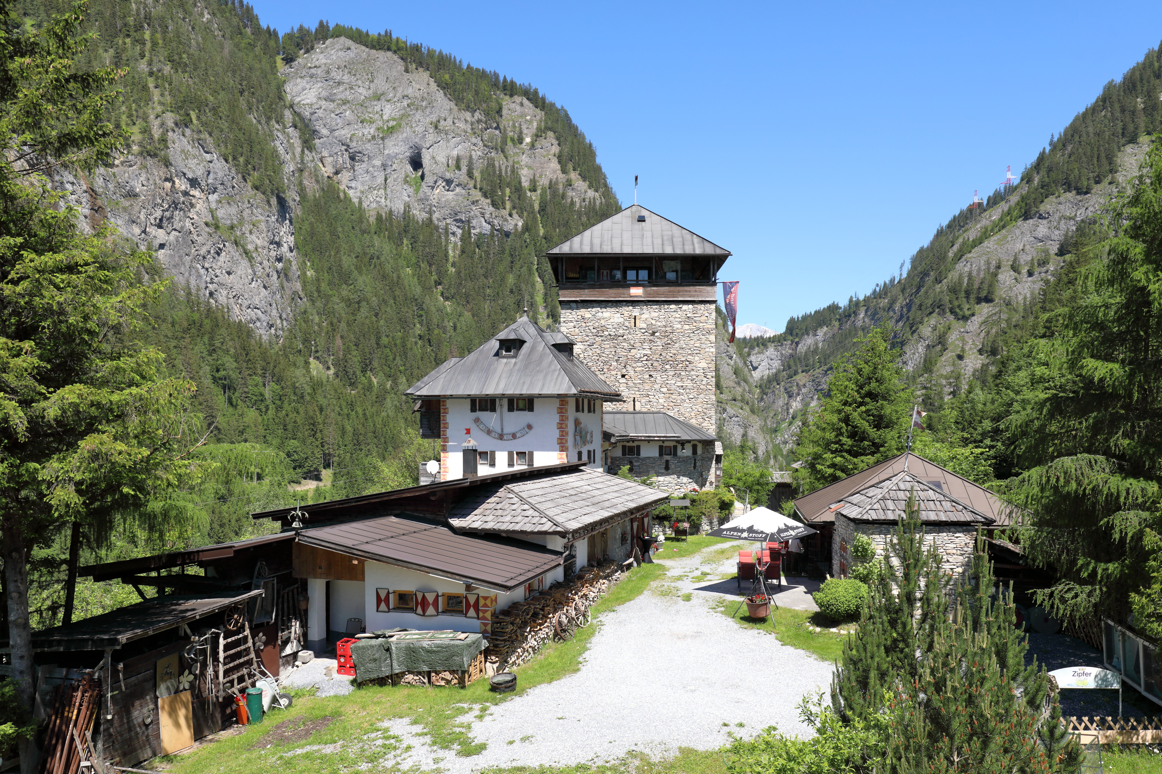 Südansicht der Burg Klammstein in der Salzburger Gemeinde Dorfgastein.Die Burg wurde im 13. Jahrhundert auf einem etwa 30 m hohen Felsen südseitig der Gasteiner Klamm bzw. am Taleingang des Gasteinertales errichtet. Ab dem 16. Jahrhundert verfiel die Burg und das Mauerwerk wurde teilweise als Steinbruch für andere Bauten verwendet. 1972 kaufte ein Adolf Ferner die Ruine den Österreichischen Bundesforsten ab und sanierte die Burg bzw. baute sie teilweise wieder auf.